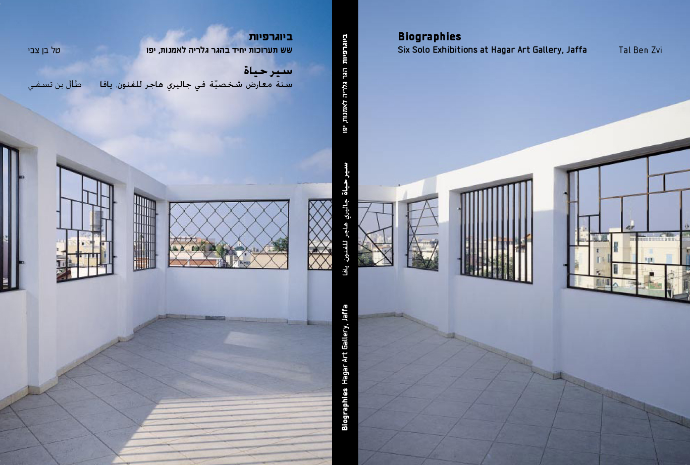 בן צבי, טל, 2006. ביוגרפיות, 6 תערוכות יחיד בגלריה הגר לאמנות, הוצאת עמותת הגר